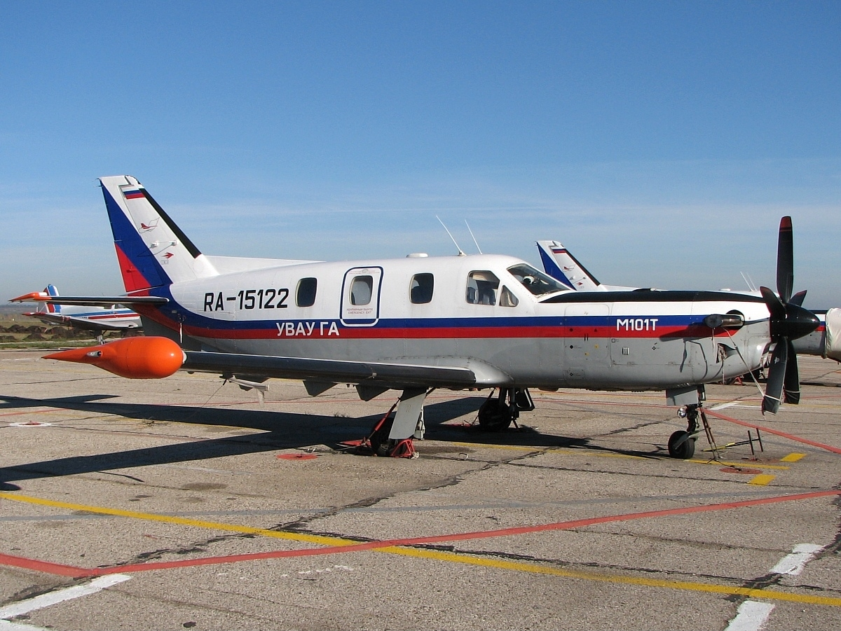 Myasischev M101T